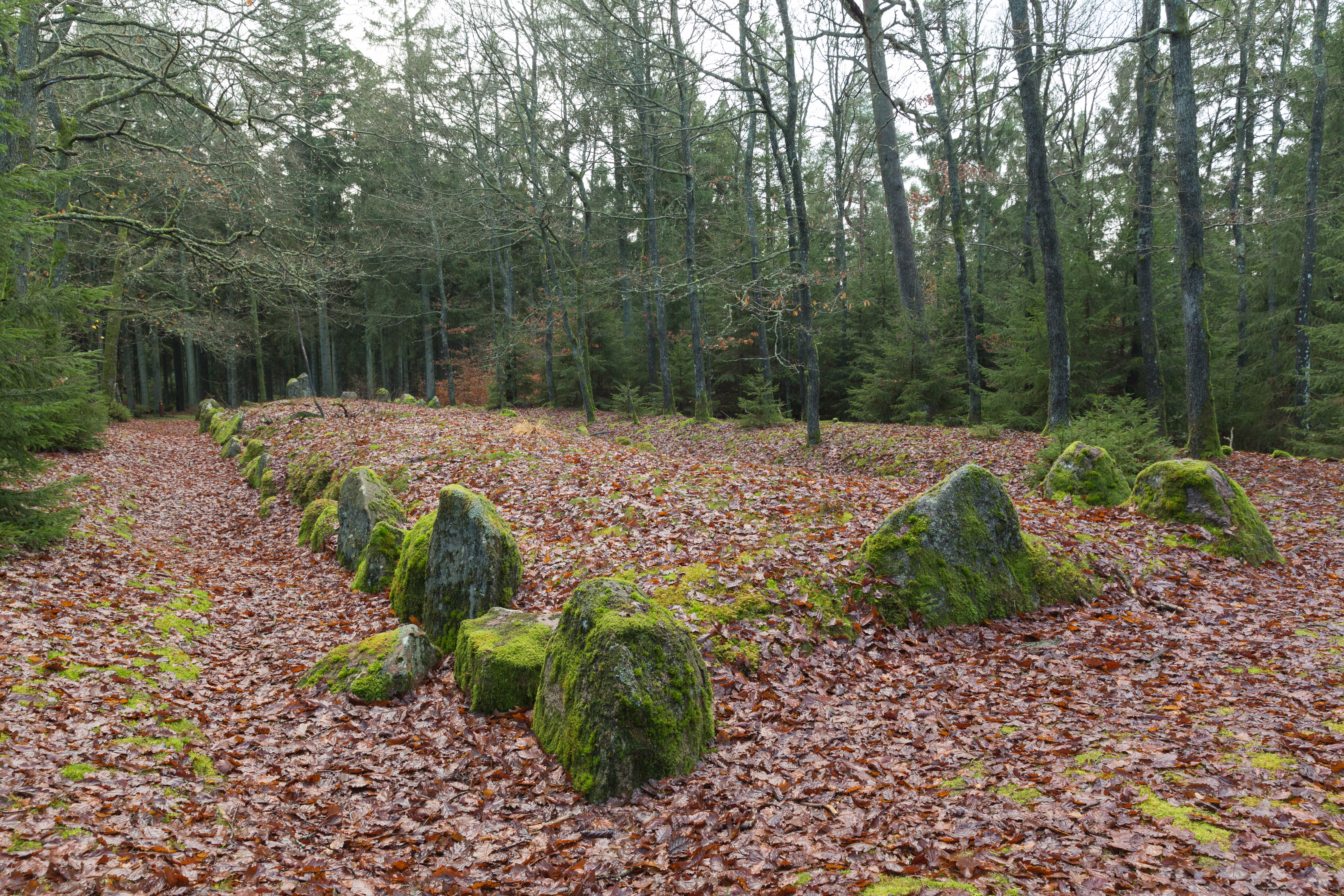 Jens Langknivs hule